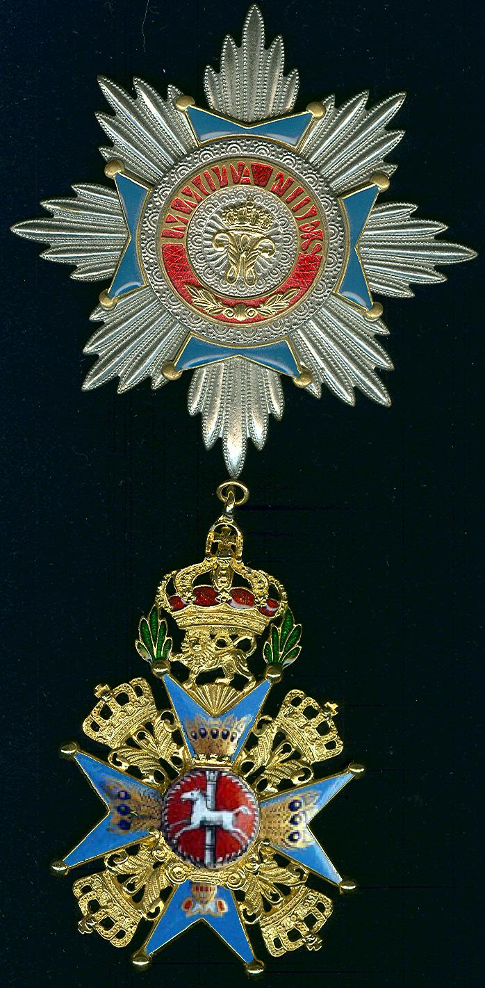 Uit mijn eigen collectie. Ik was niet tevreden met de scan met een gele achtergrond. Hierop ziet men de details beter. Op dit kruis uit 1825 berust geen auteursrecht. Robert Prummel 18 jun 2006 01:15 (CEST)